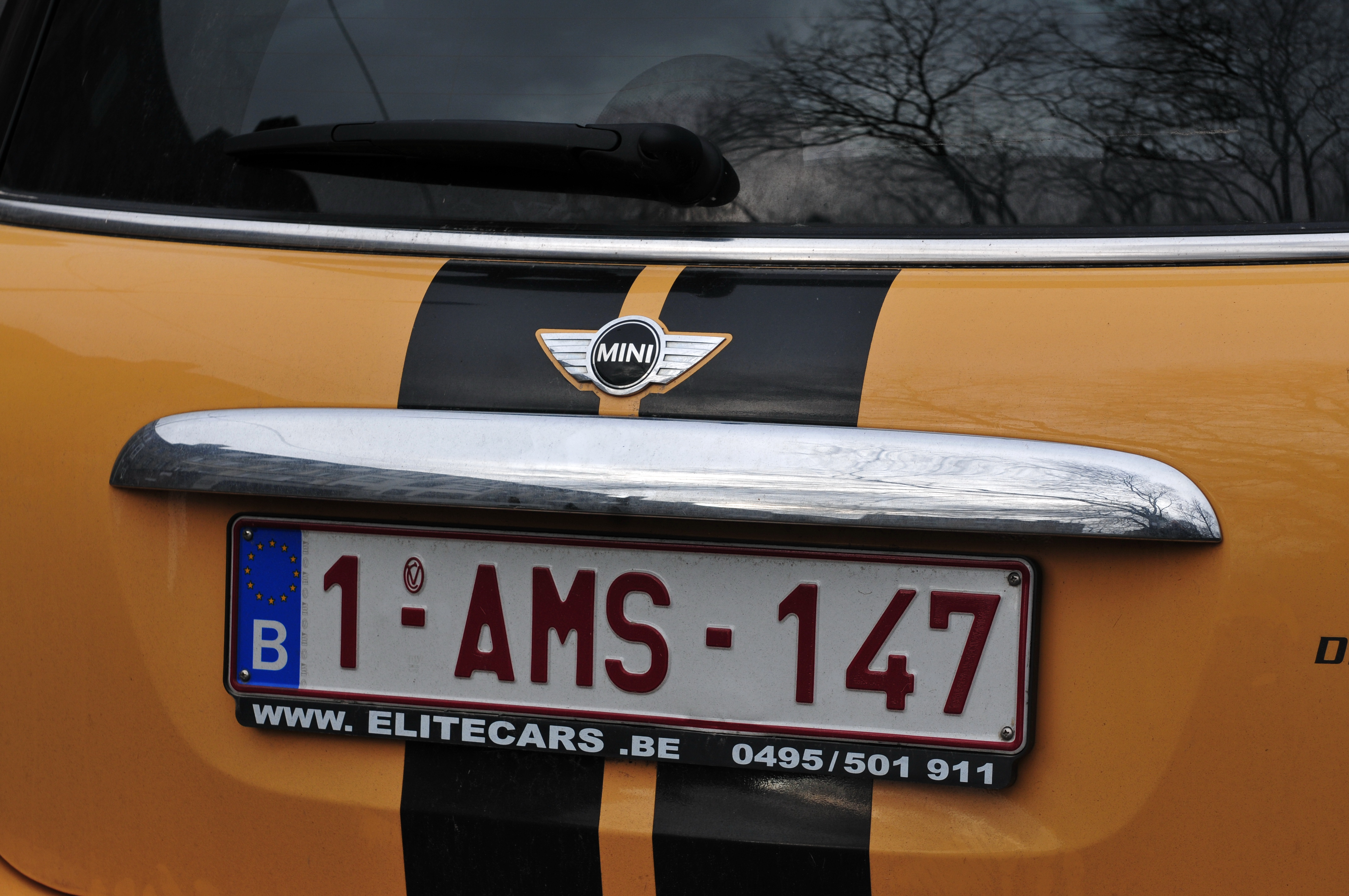 Lüttich